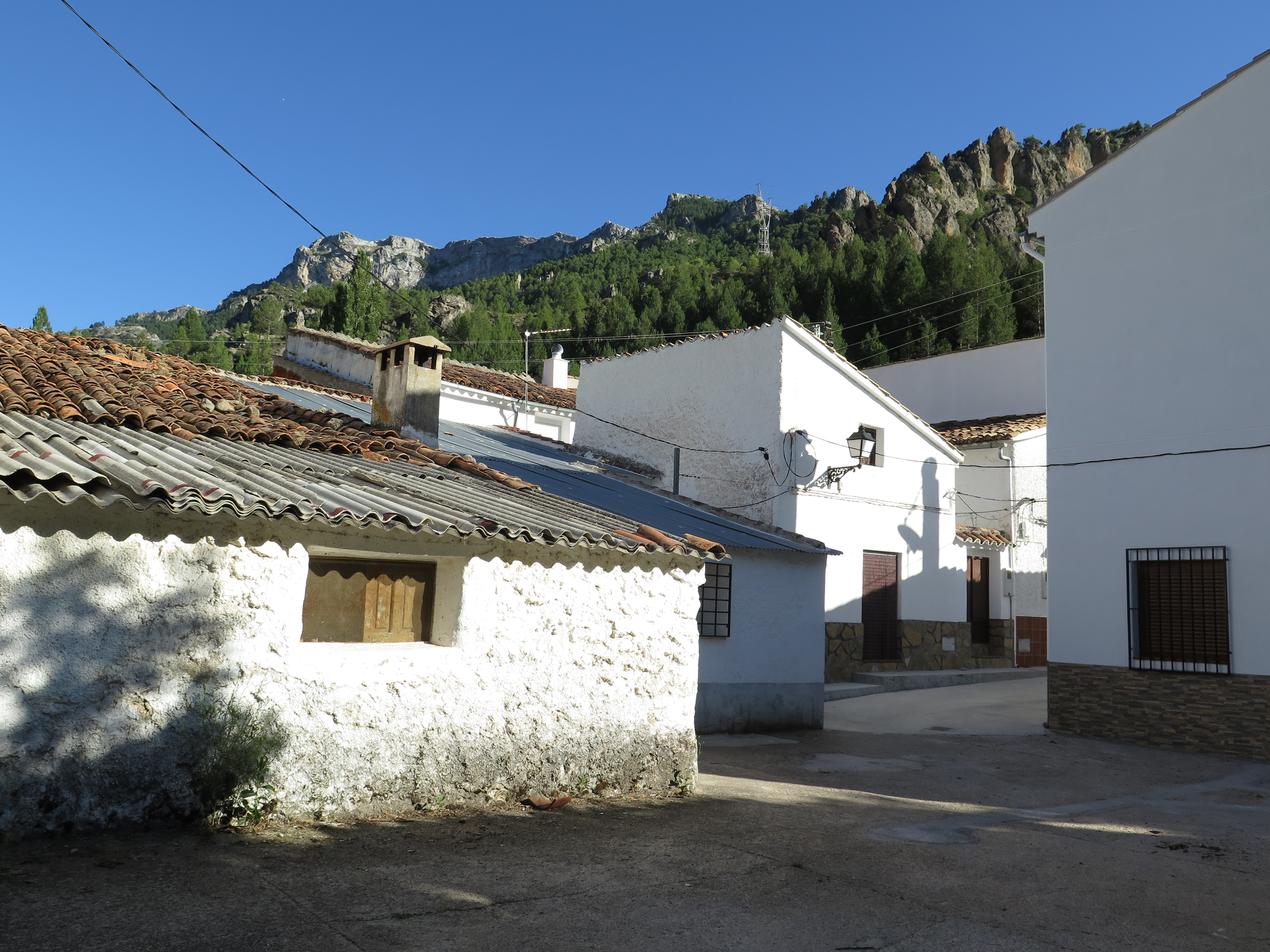 Cruce de calles en la aldea segureña de Los Anchos.